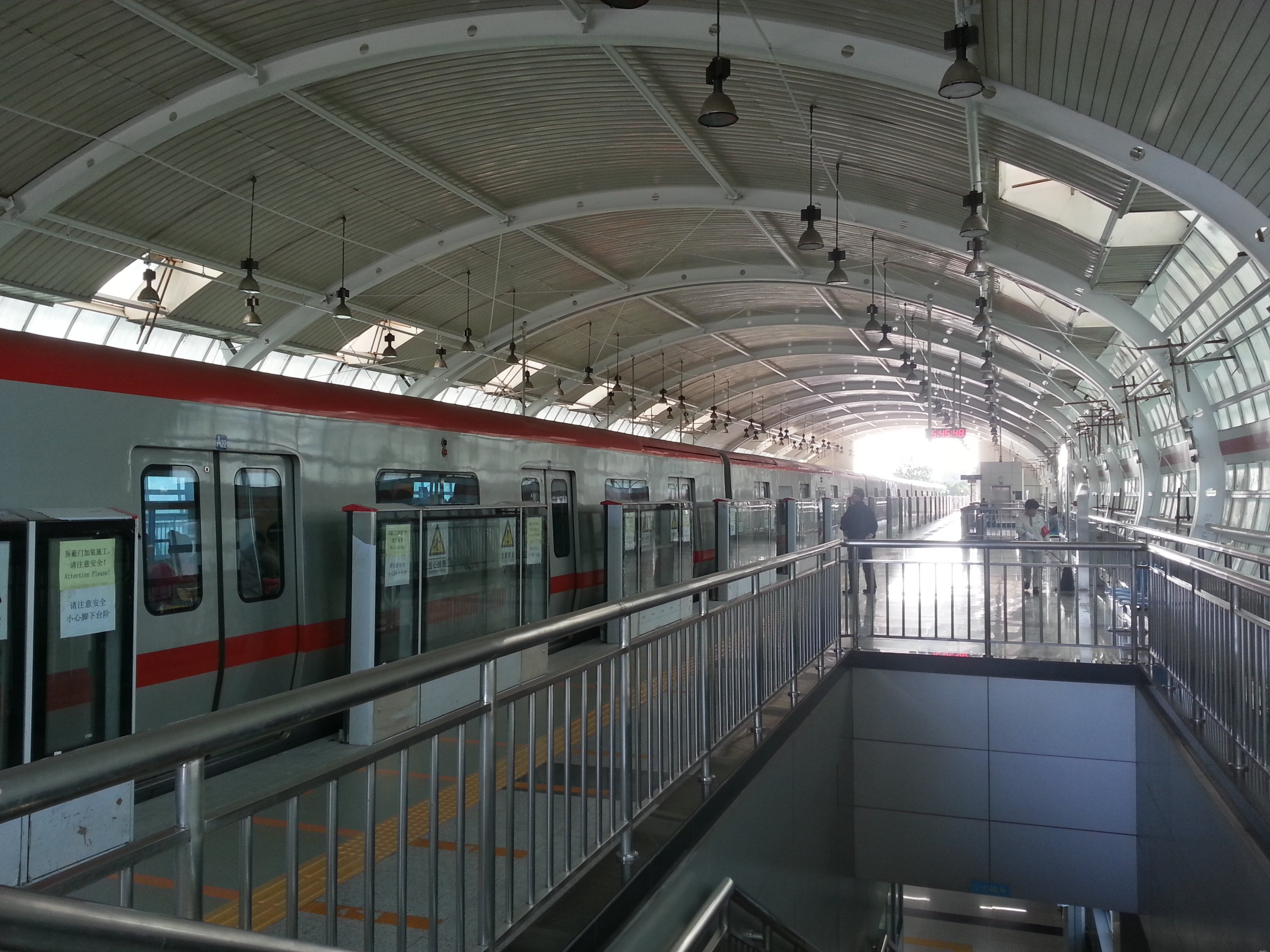 八里桥站站内